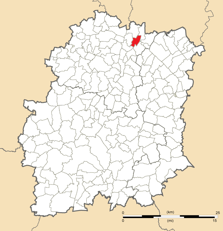 Carte de position de Morangis en Essonne (91)